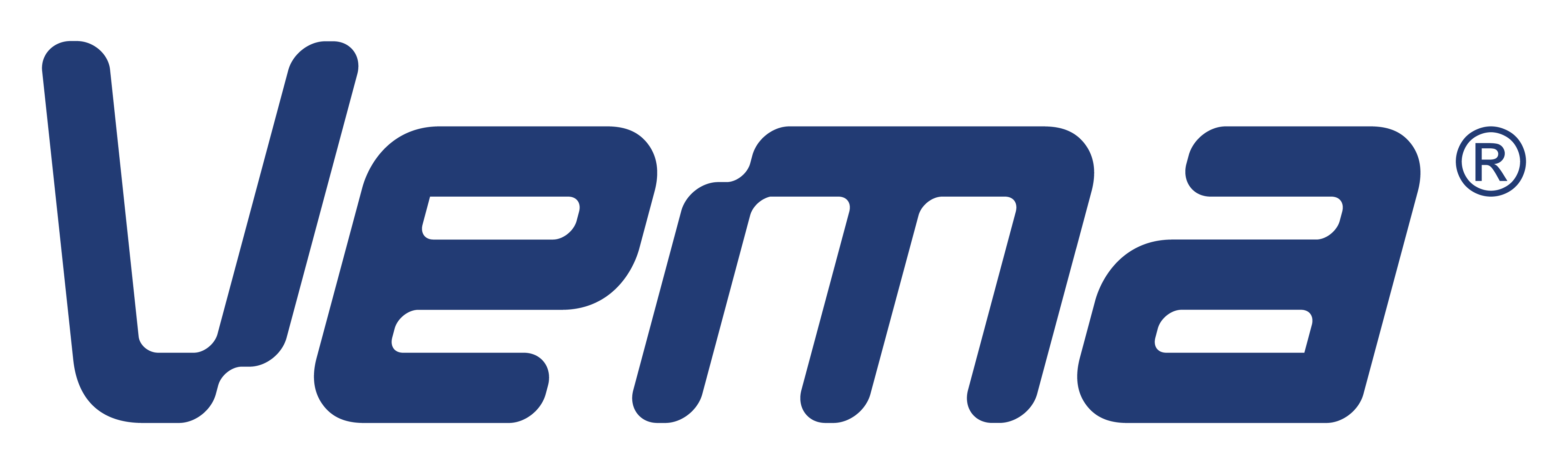 logo společnosti Vema